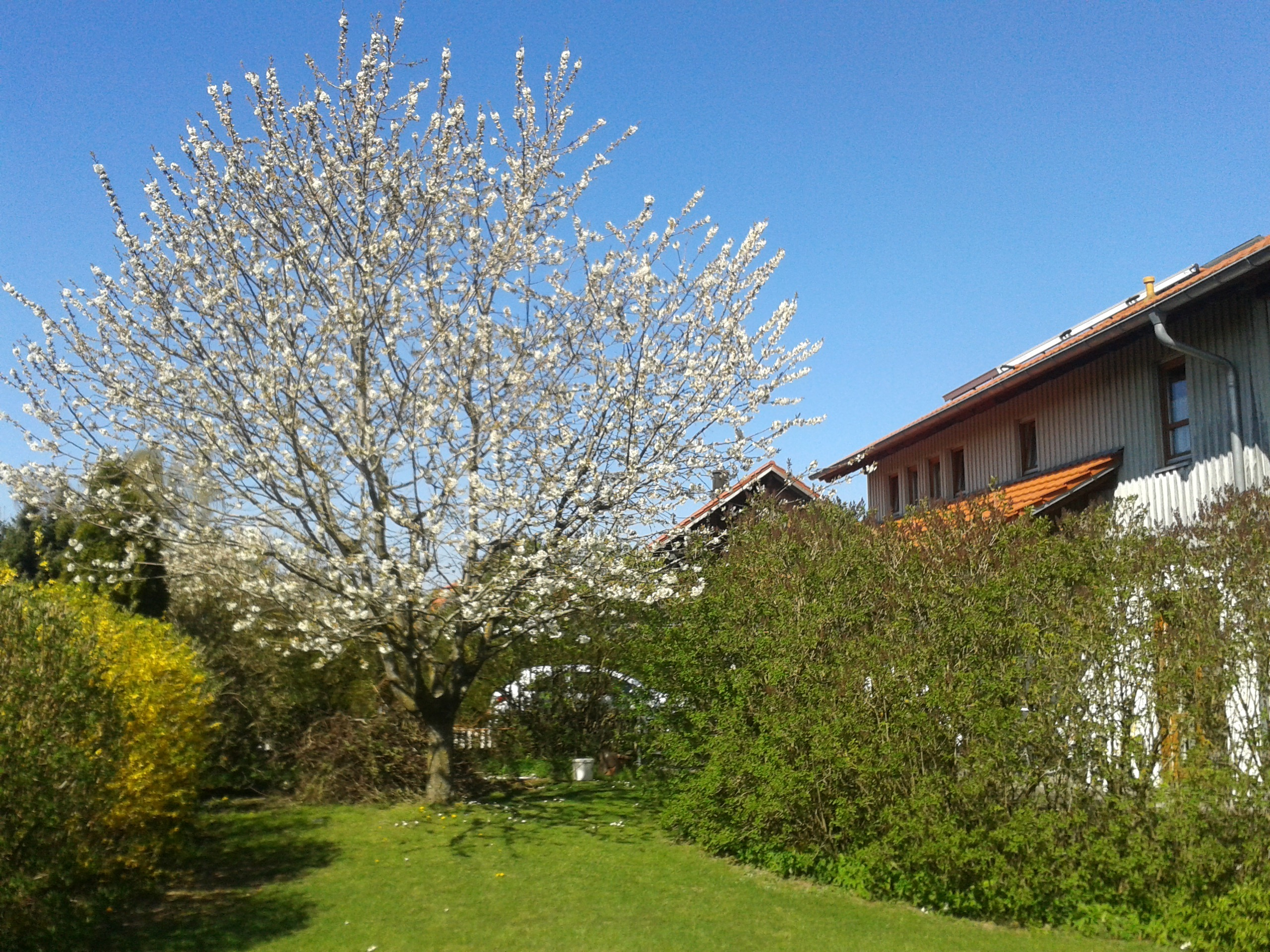 Blühender Kirschbaum in Tannheim